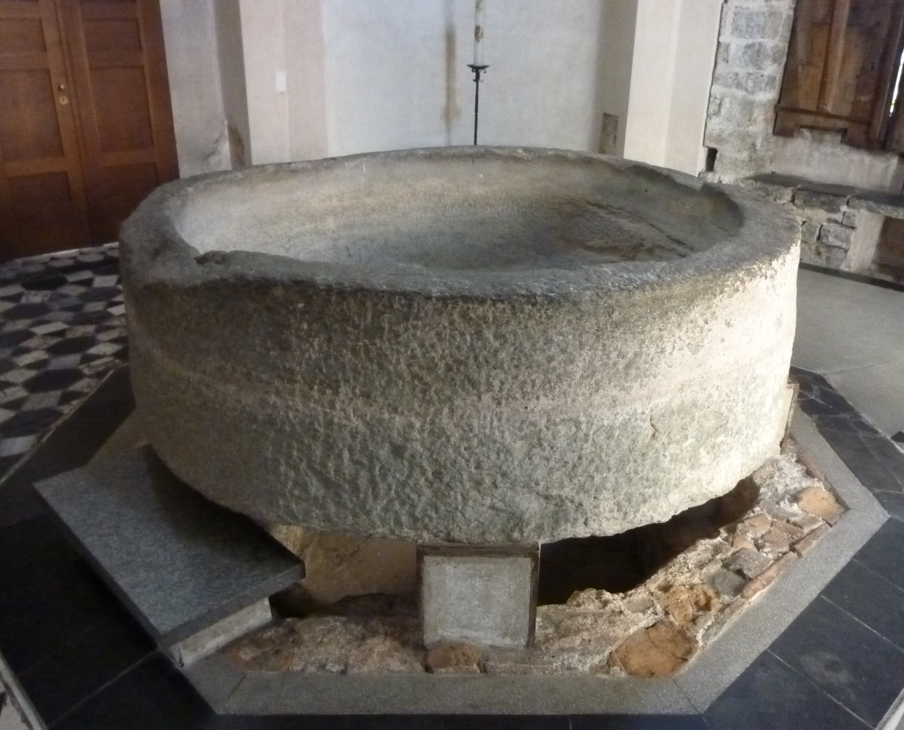 Baptisterium Riva San Vitale Taufbecken